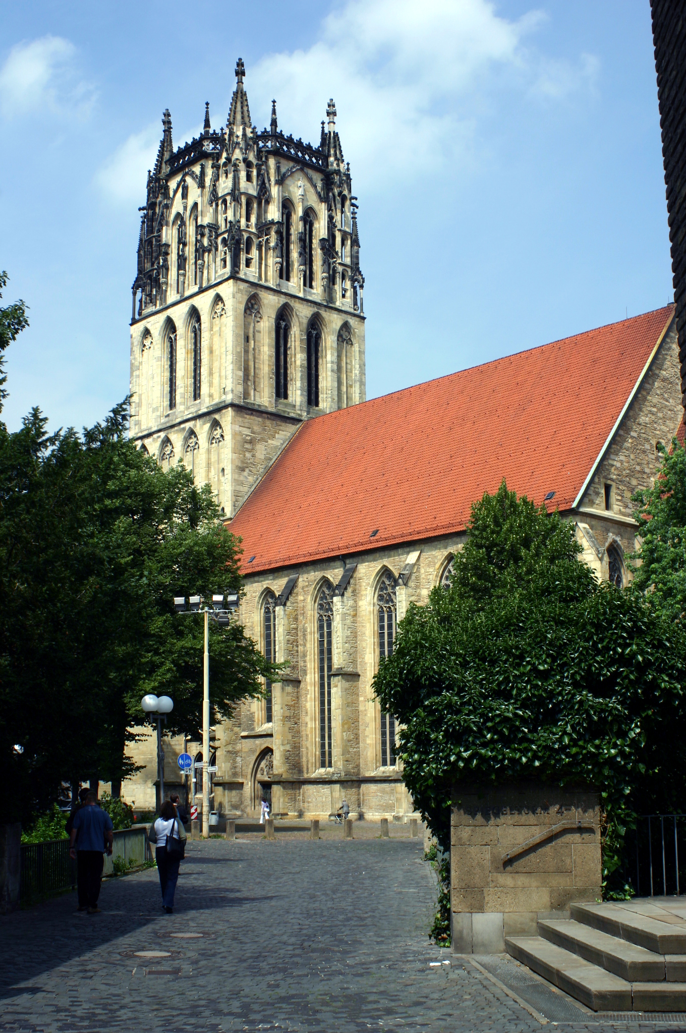 Münster, Überwasserkirche (Liebfrauen-Überwasser)